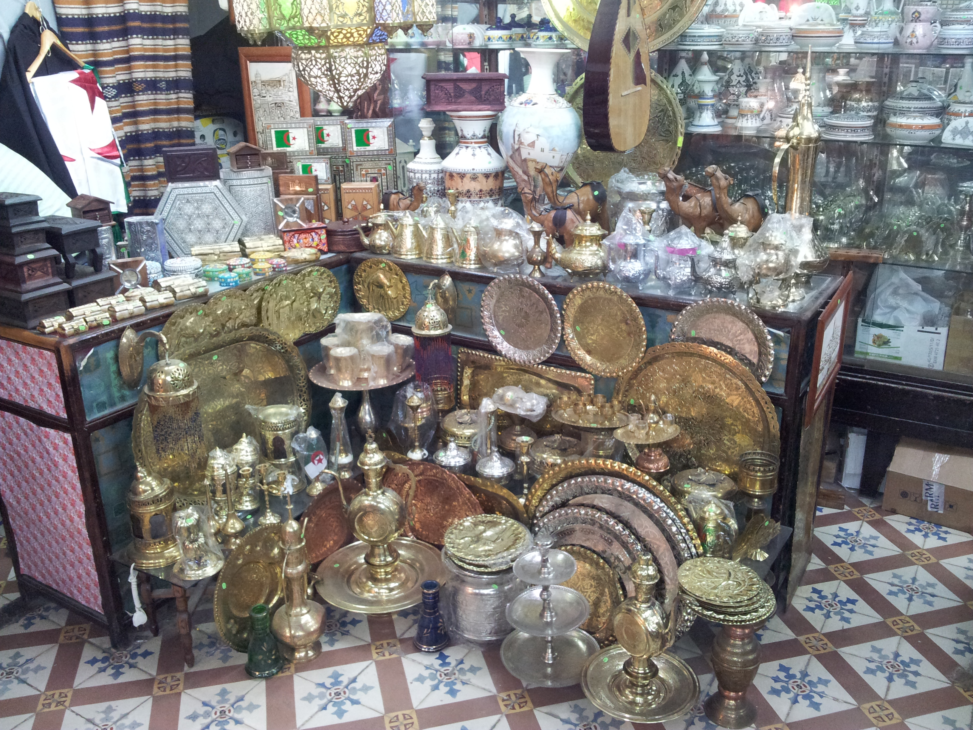 Cuivre (Artisanat algérien)